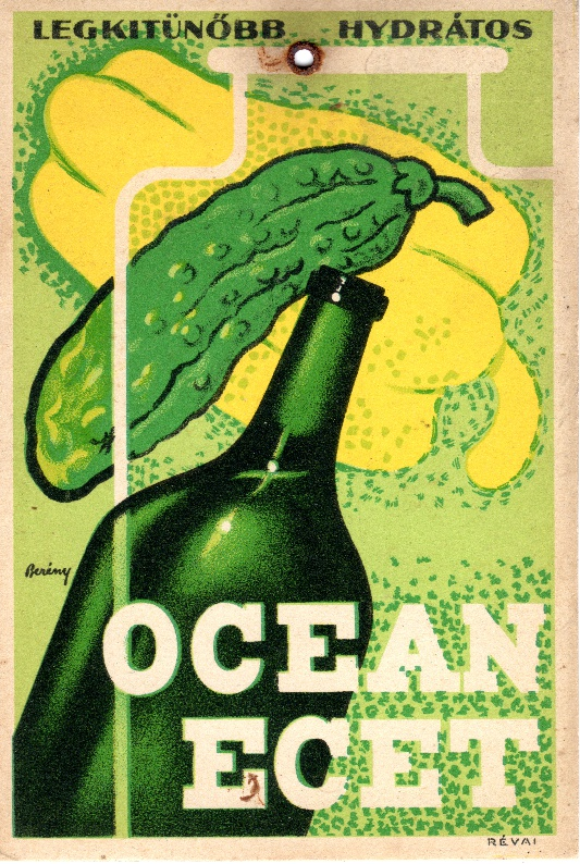 tervezte: Berény Róbert, 1930-as évek eleje